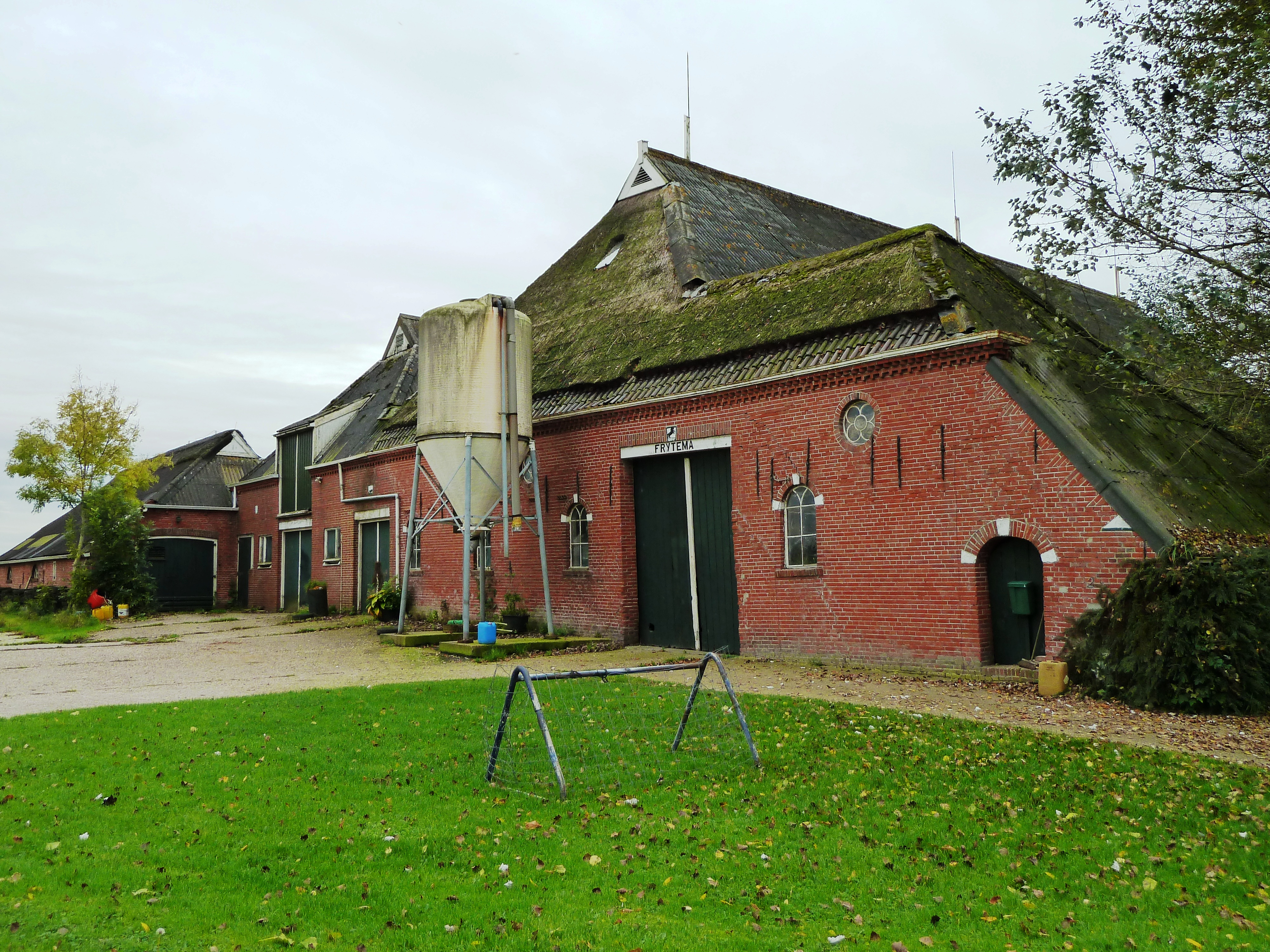 Boerderij Frytema in het gehucht Frytum (Groningen, Nederland)